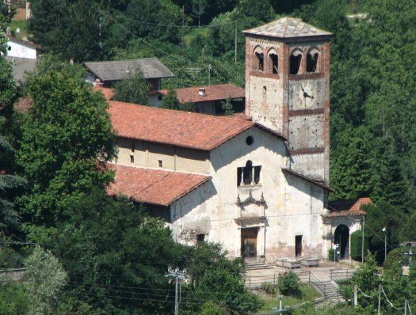 opera propria, foto, Abbazia dei Santi Pietro e Colombano di Pagno, licenza libera